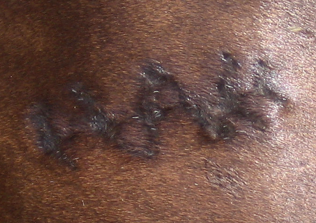 Brandzeichen eines Brandenburger Warmblutes